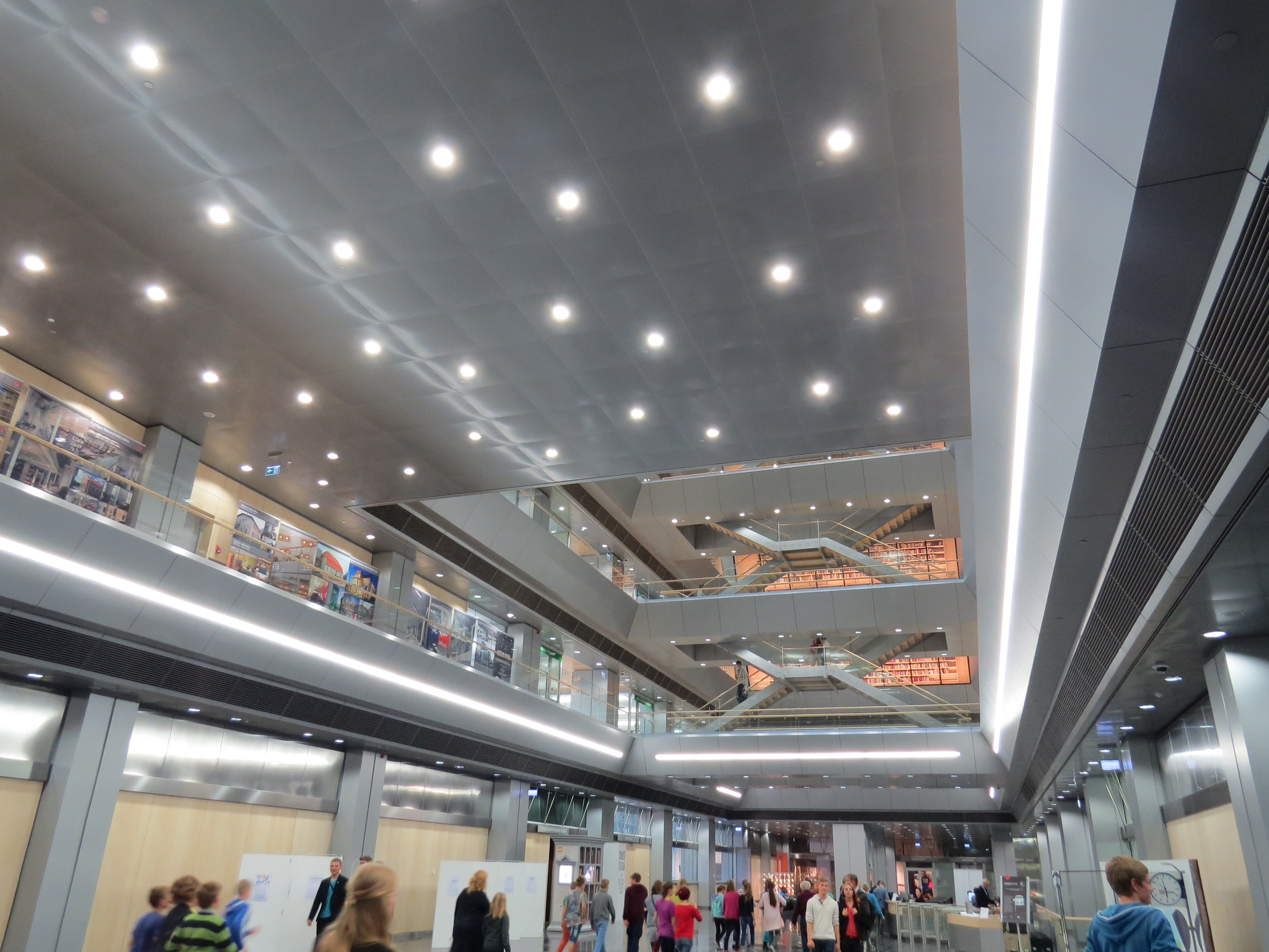 Interiør fra Letlands Nationalbibliotek - Gaismas pils - Riga